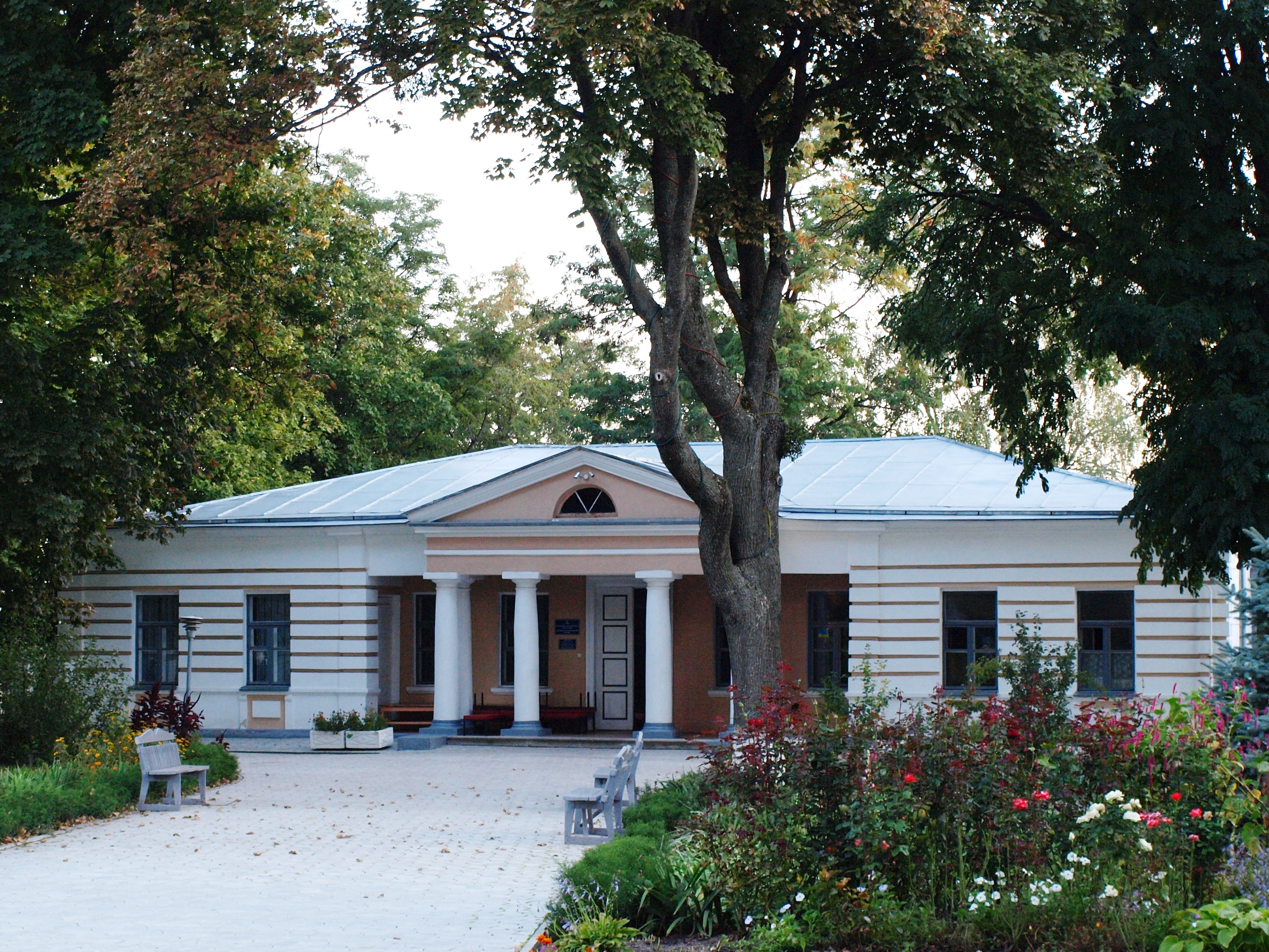 Флігель В.Г.Короленка (корпус музею В.Г.Короленка)